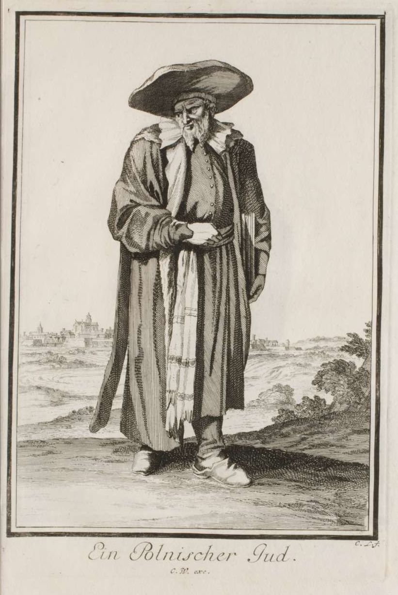 Bild eine Polinischen Juden aus Neu-eröffnete Welt-Galleria, Worinnen [...] allerley Aufzüg und Kleidungen unterschiedlicher Stände und Nationen. Der Abbgebildete trägt aus Polen und Deutschland stammende Kleidungsstücke. Siehe ([1])